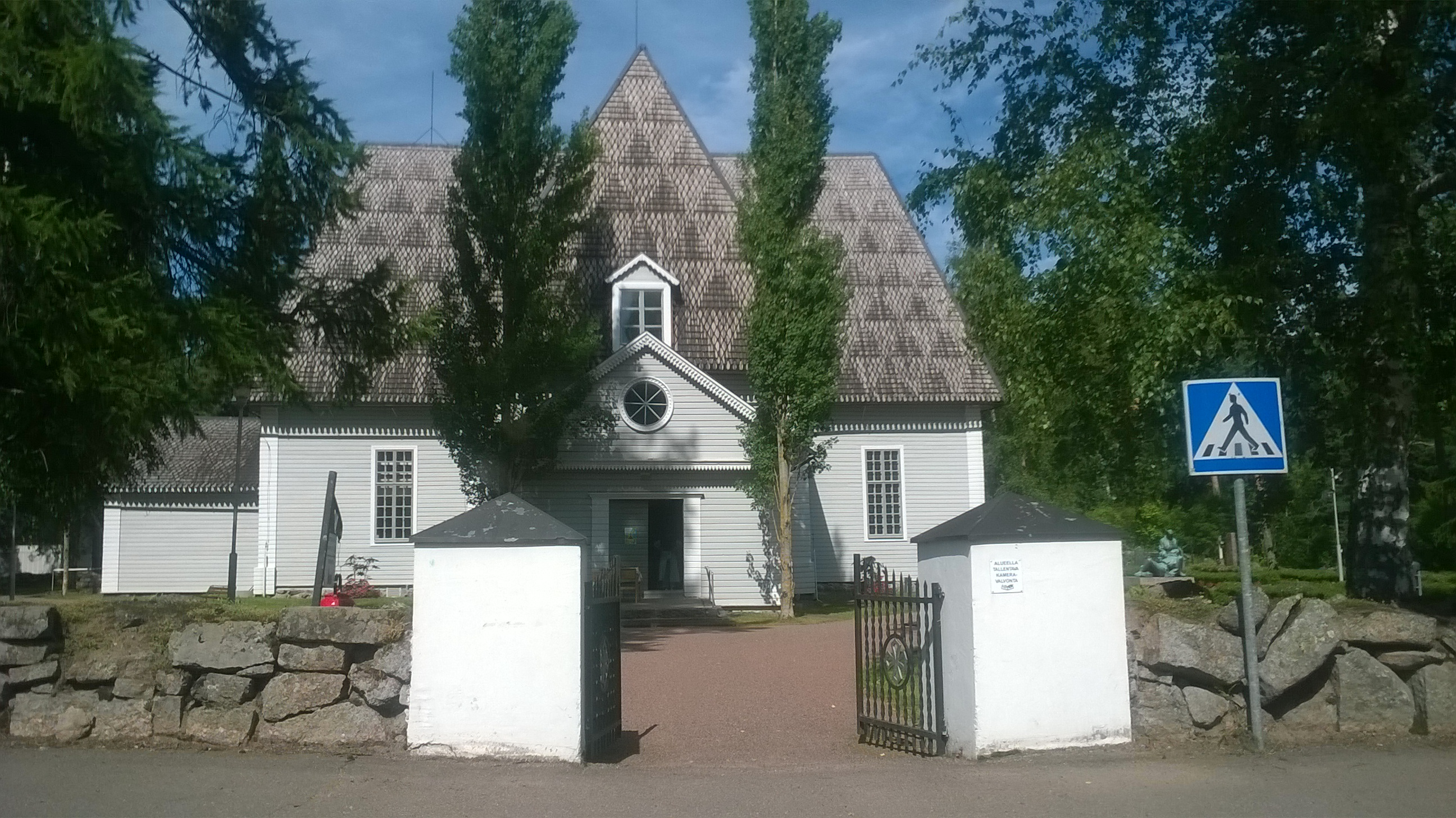 Elimäen kirkko